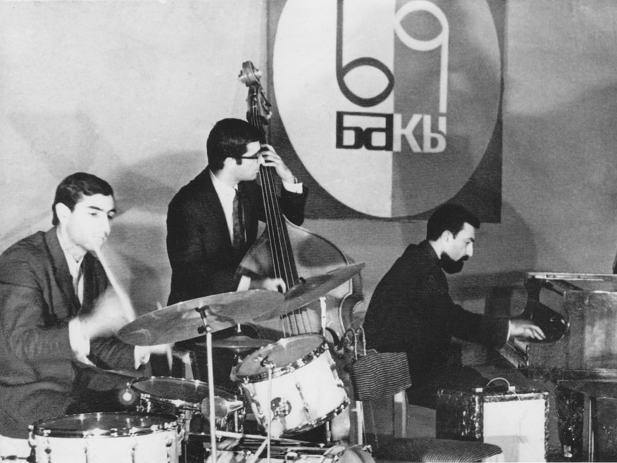 Caz-69 - Vaqif Mustafazadə. Qızıl payız festivalı. 1969